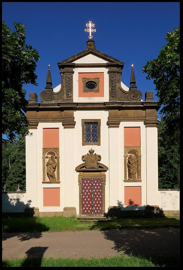 Kostel sv. Isidora (Budenice), Budenice